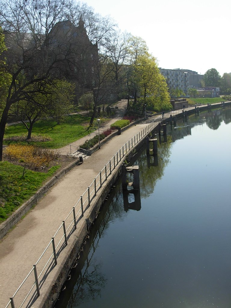 Bulwar nad Brdą w Bydgoszczy-Śródmieściu